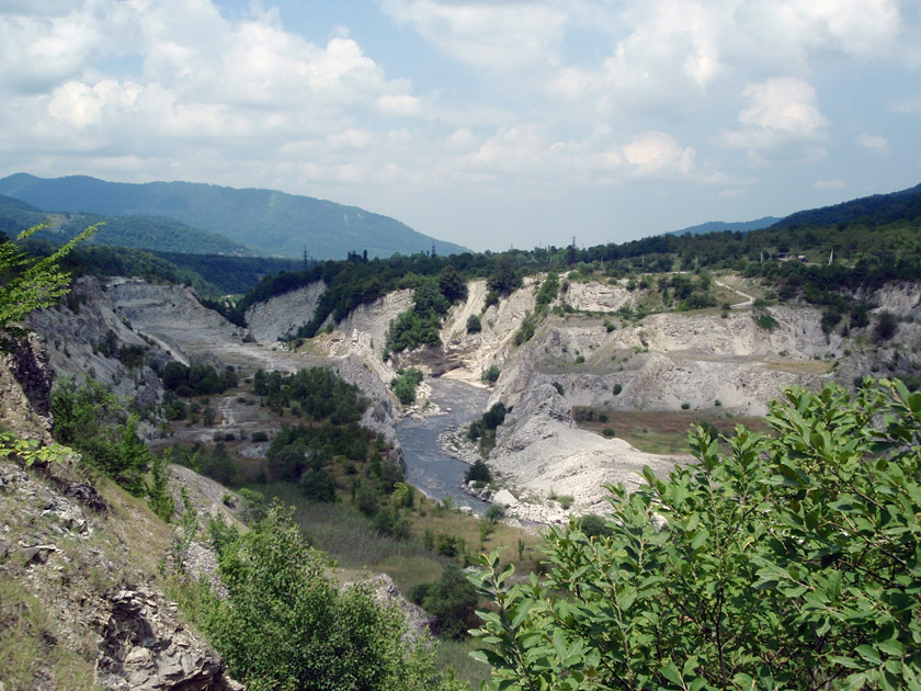 Противоположный берег Ярыш-Марды. Дорога, которая видна на другом берегу — как раз въезд в него. Находится на трассе в Шатой